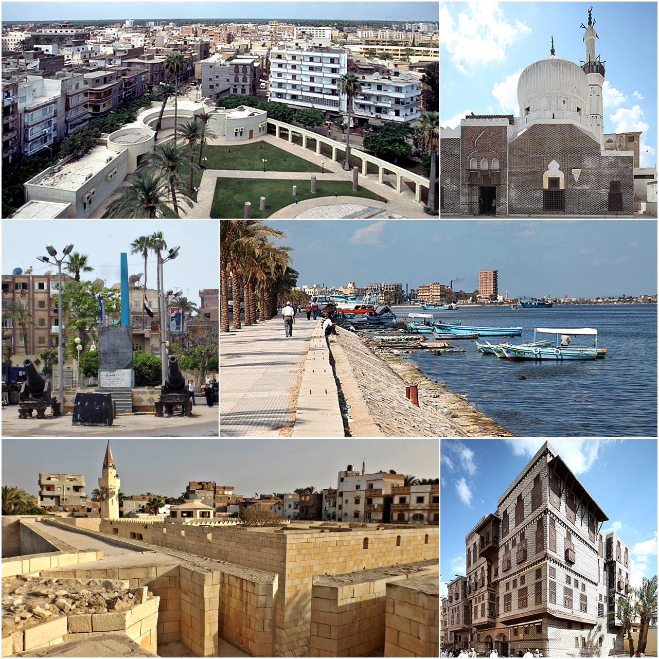 صور عامة لمعالم مدينة رشيد، مصر